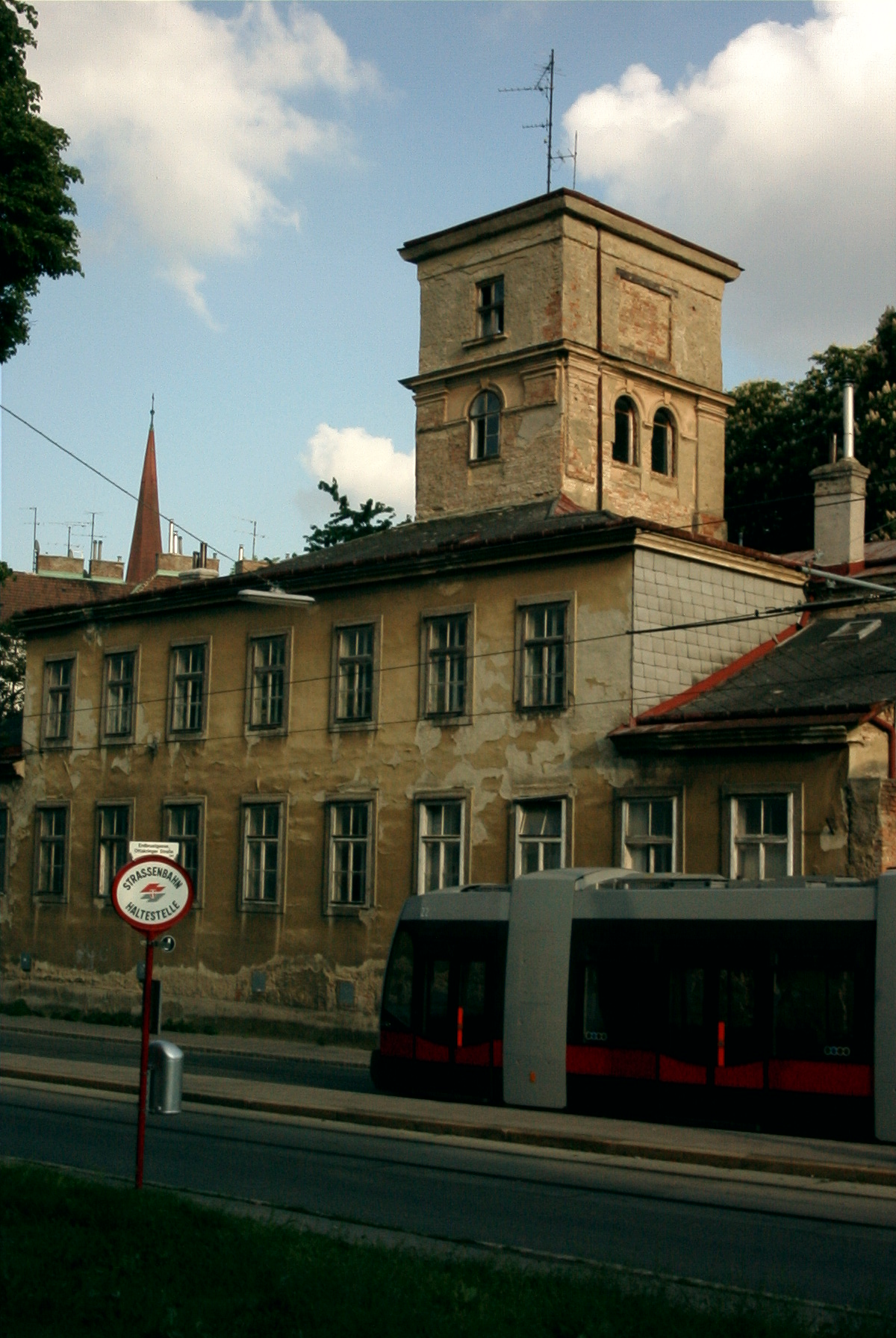 Kornhäusel-Villa